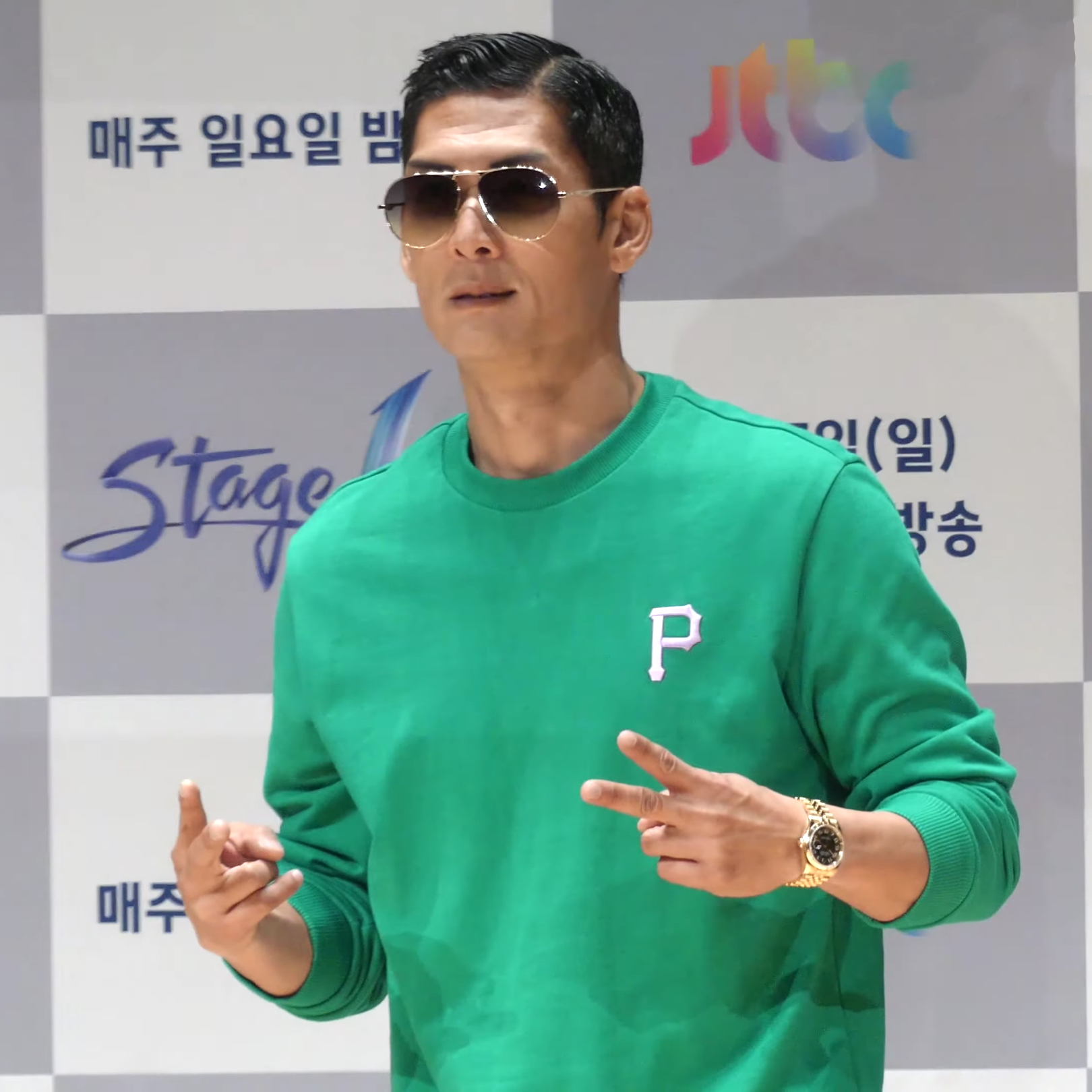 JTBC 글로벌 K-POP 챌린지 '스테이지K' 제작발표회가 2일 오후 서울 마포구 JTBC 사옥에서 열렸다.